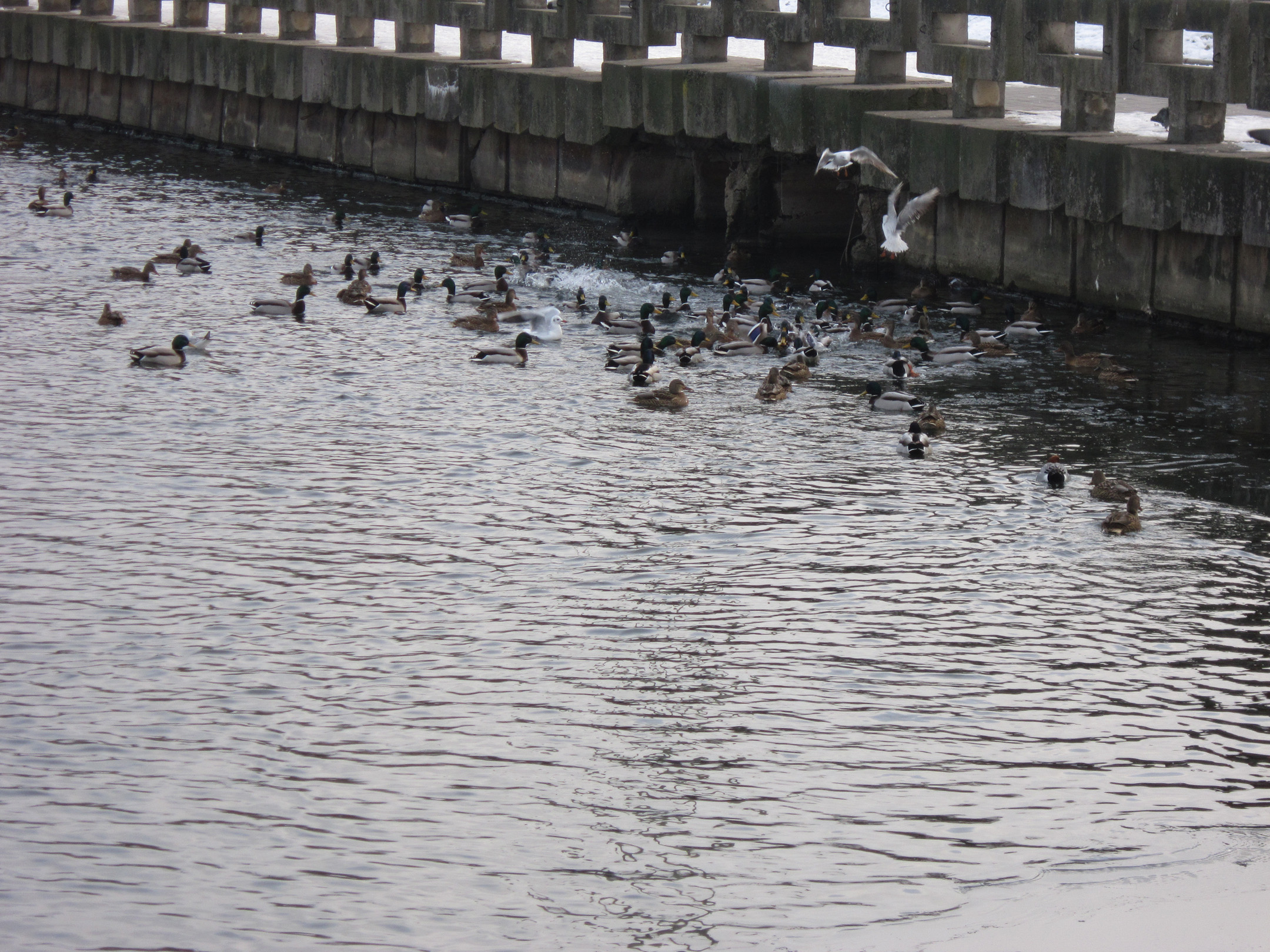 Минск. Коллектор, по которому течёт река Немига, впадает в Свислочь